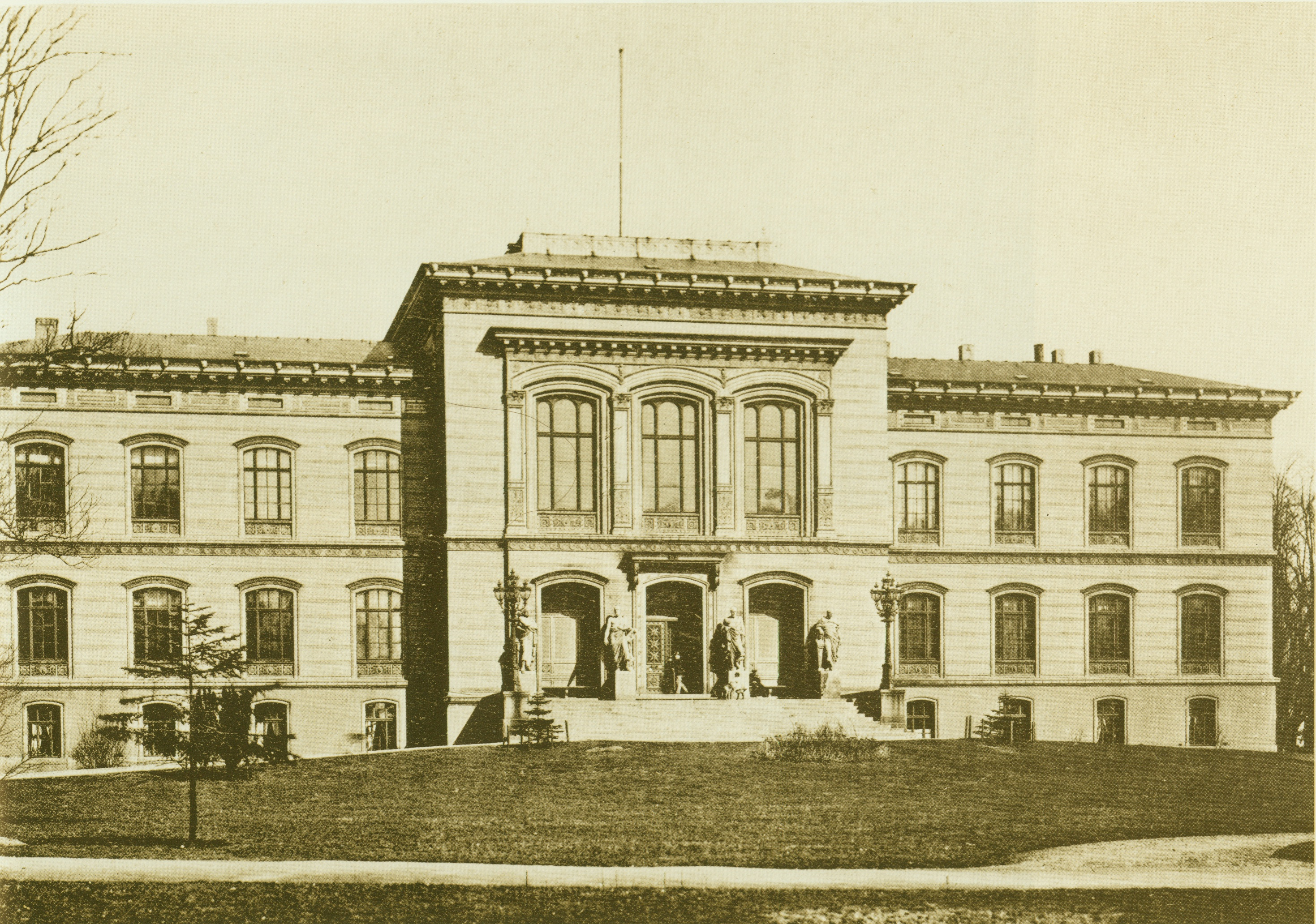 Kiel: Hauptgebäude der Christian-Albrechts-Universität (1893)